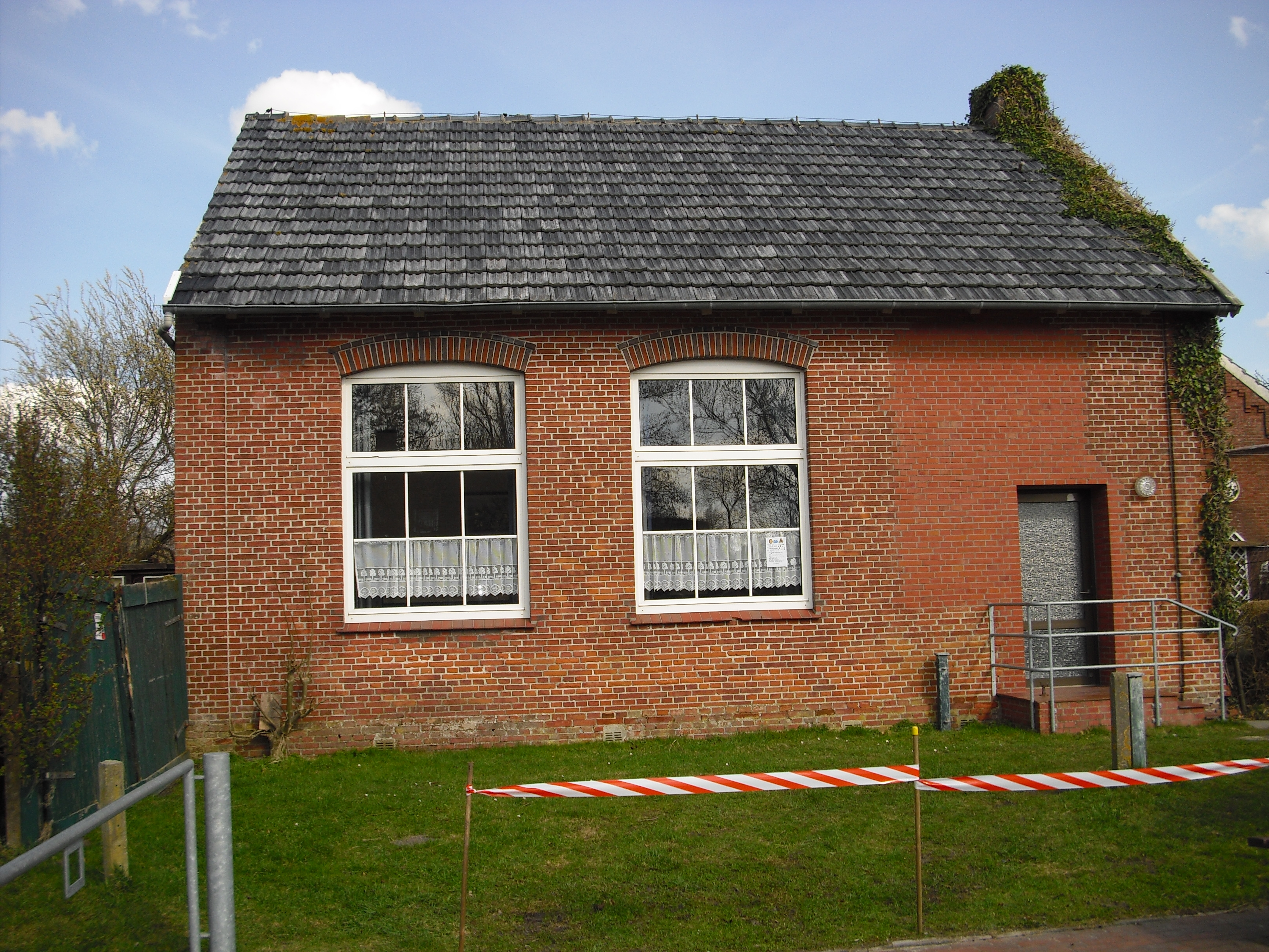 Ehemalige einklassige Volksschule in Ostermarsch